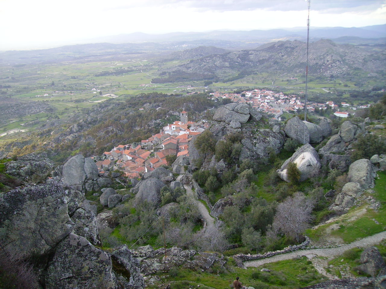 Aldeia de Monsanto, vista geral